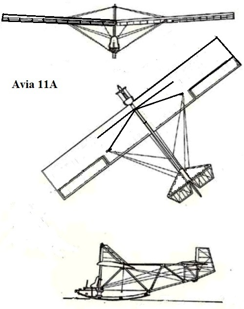 Crtež jedrilice AVIA 11A